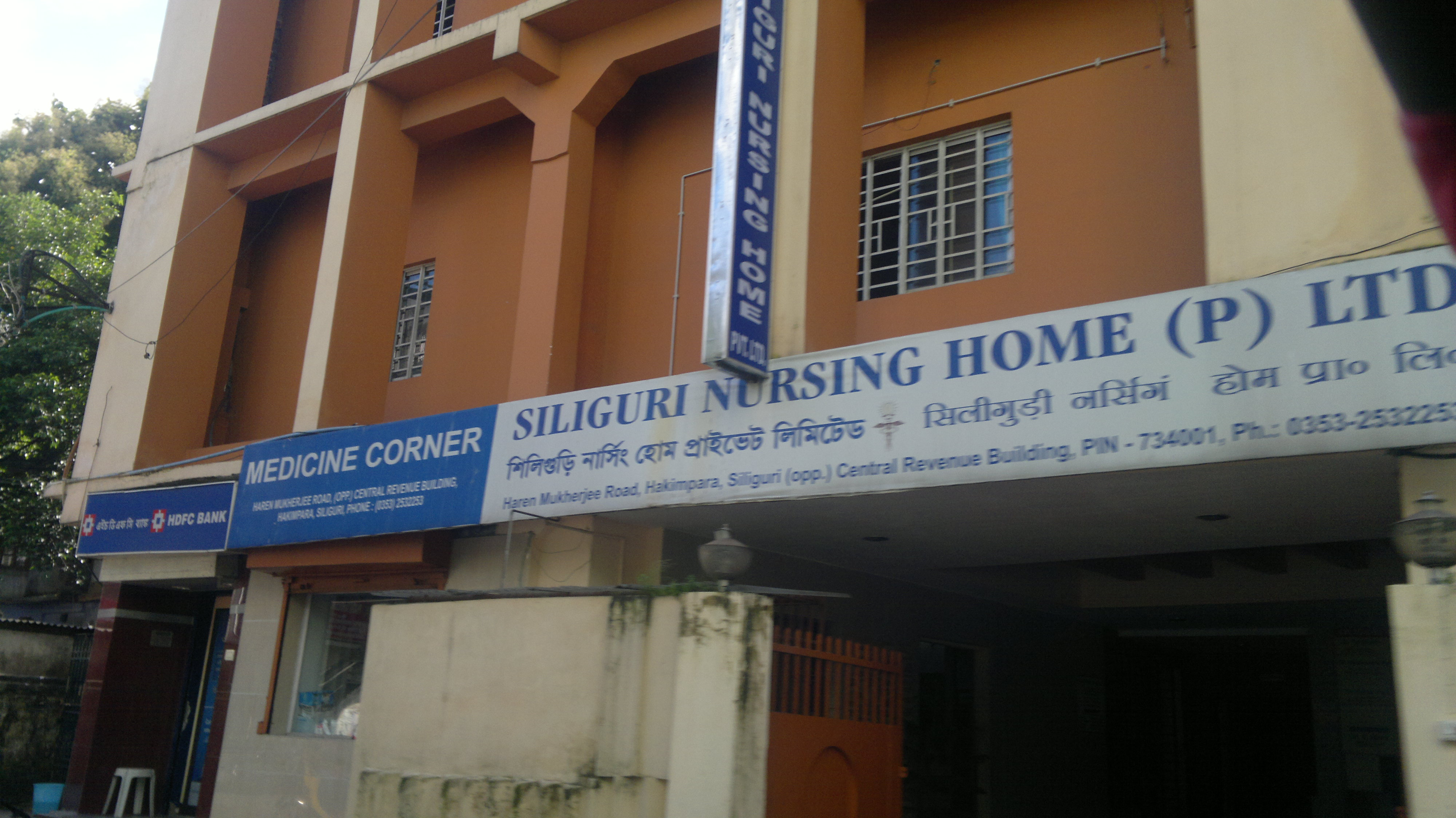 Siliguri Nursing Home, Haren Mukherjee Road